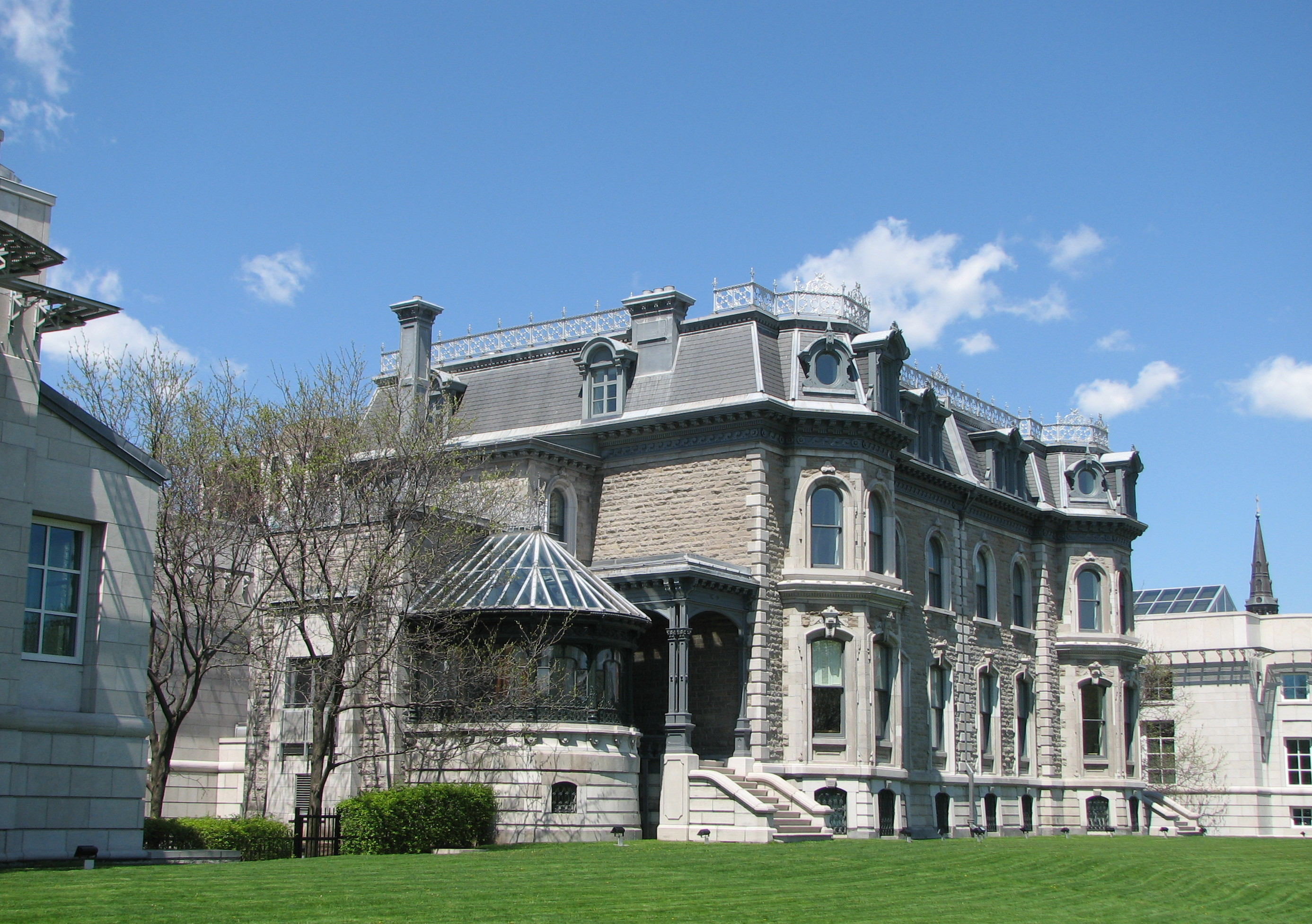 Bâtiment du Centre canadien d'architecture